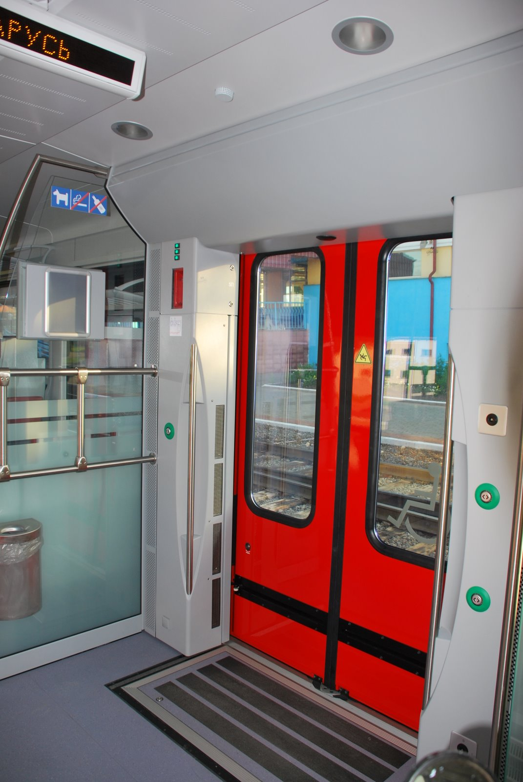 дзьверкі з кнопкамі.